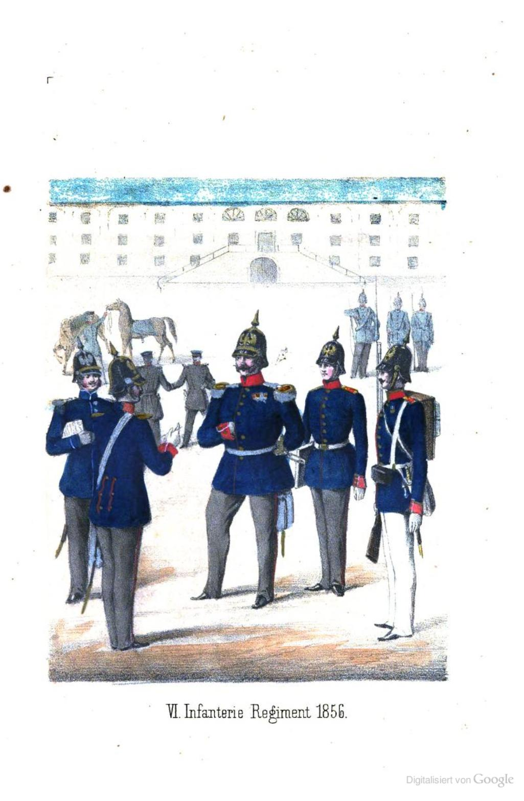 6.preußisches-Infanterie-Regiment in Uniformen von 1856